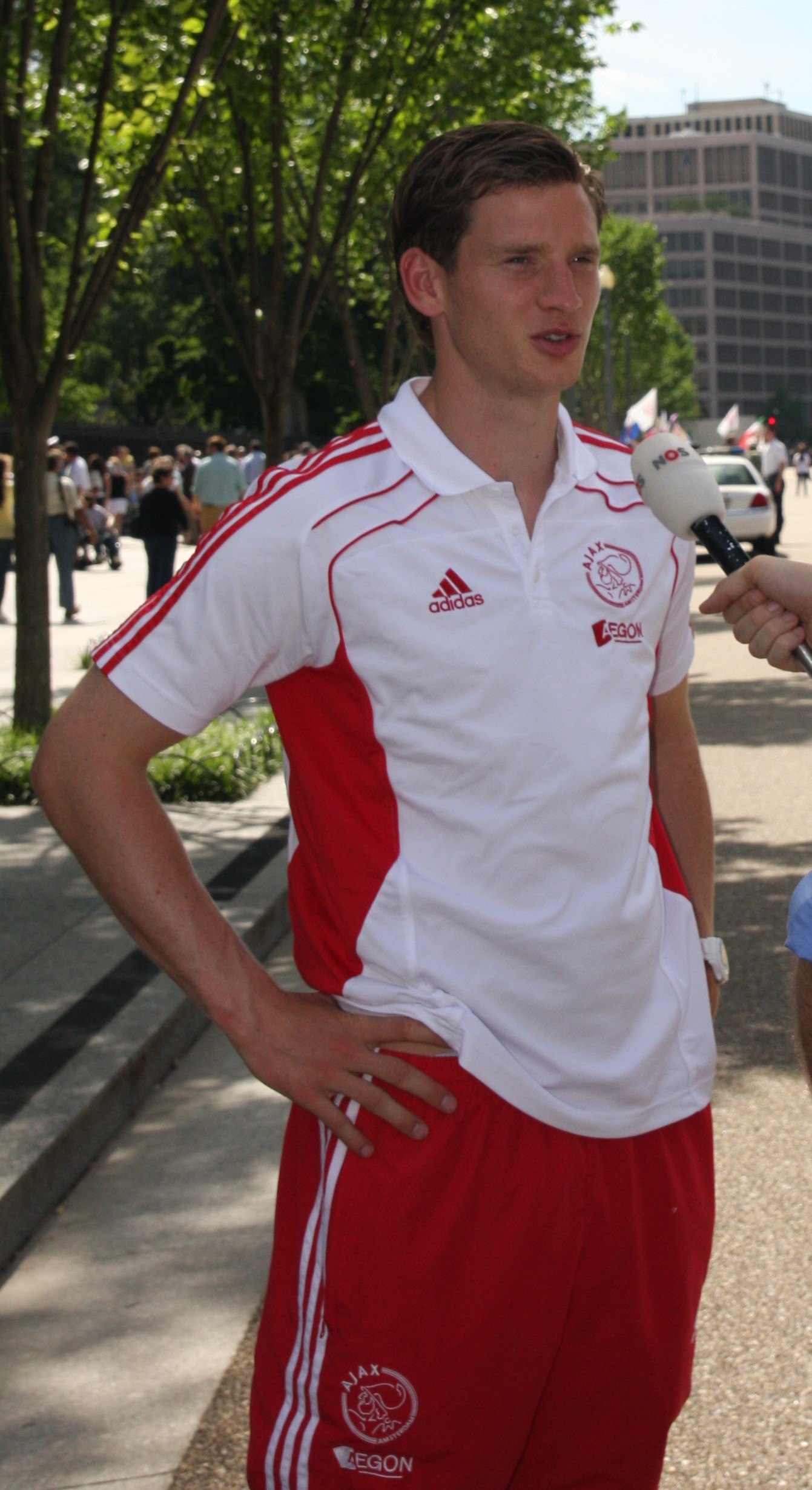 Jan Vertonghen